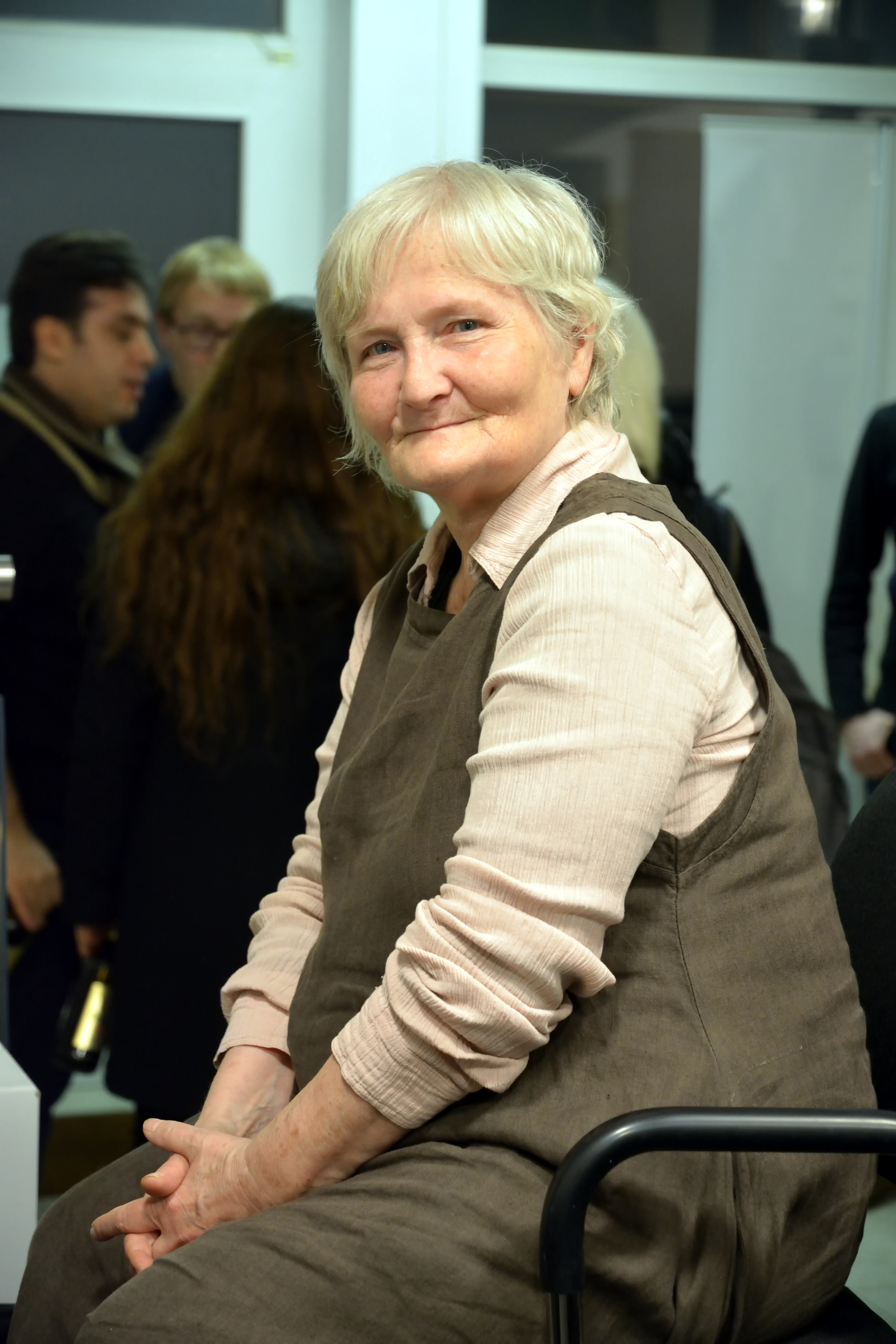 Impressionen der Geburtstags-/Weihnachtsfeier im WikiBär 2017. Hier